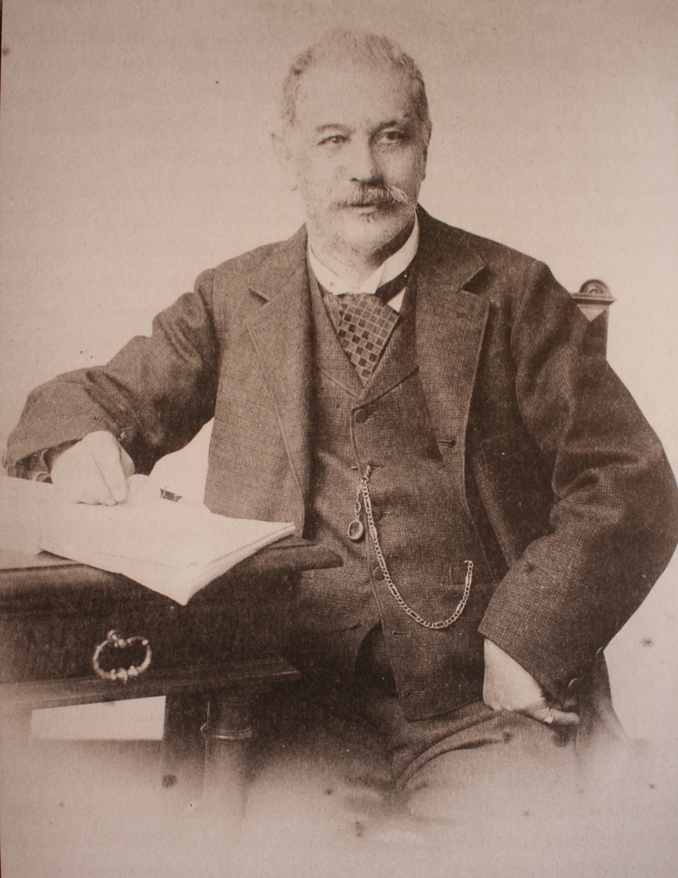 Ritratto dello storico e archeologo italiano Enrico Bianchetti.